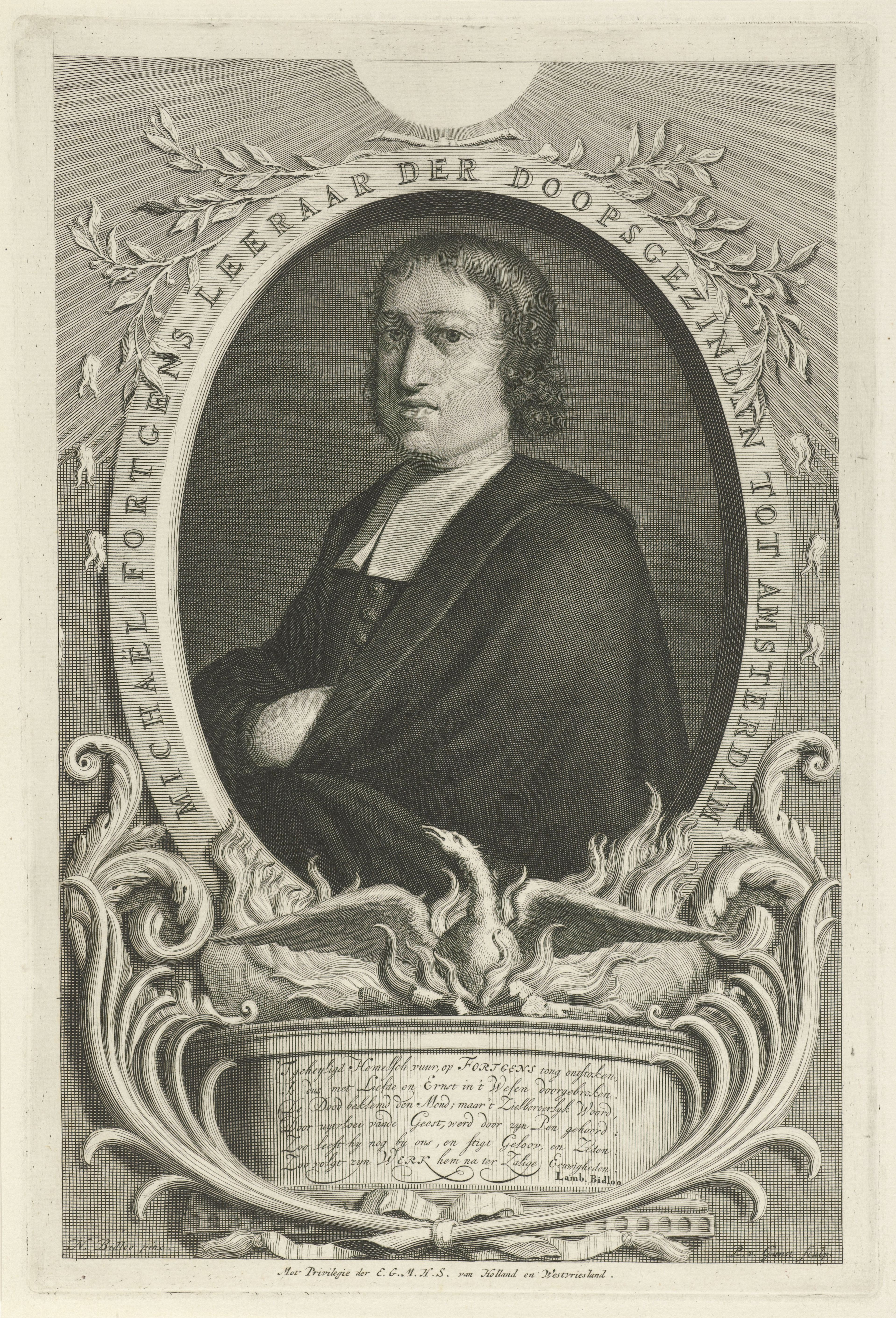 IdentificatieTitel(s): Portret van Michael FortgensObjecttype: prent Objectnummer: RP-P-OB-55.776Catalogusreferentie: FMP 1707Opschriften / Merken: verzamelaarsmerk, verso midden onder, gestempeld: Lugt 240Omschrijving: Michael Fortgens, Amsterdams predikant en leraar van de doopsgezinde gemeente aldaar. Onder het portret een feniks en een Nederlands gedicht over zijn leven.VervaardigingVervaardiger: prentmaker: Pieter van Gunst (vermeld op object)naar schilderij van: Nicolaas Bidloo (vermeld op object)schrijver: Lambert Bidloo (vermeld op object)verlener van privilege: Staten van Holland en West-Friesland (vermeld op object)Plaats vervaardiging: AmsterdamDatering: 1695 - 1731Fysieke kenmerken: gravureMateriaal: papier Techniek: graveren (drukprocedé)Afmetingen: plaatrand: b 180 mm × h 269 mmOnderwerpWat: (story of) PhoenixWie: Michael FortgensVerwerving en rechtenVerwerving: overdracht van beheer 1816Copyright: Publiek domein